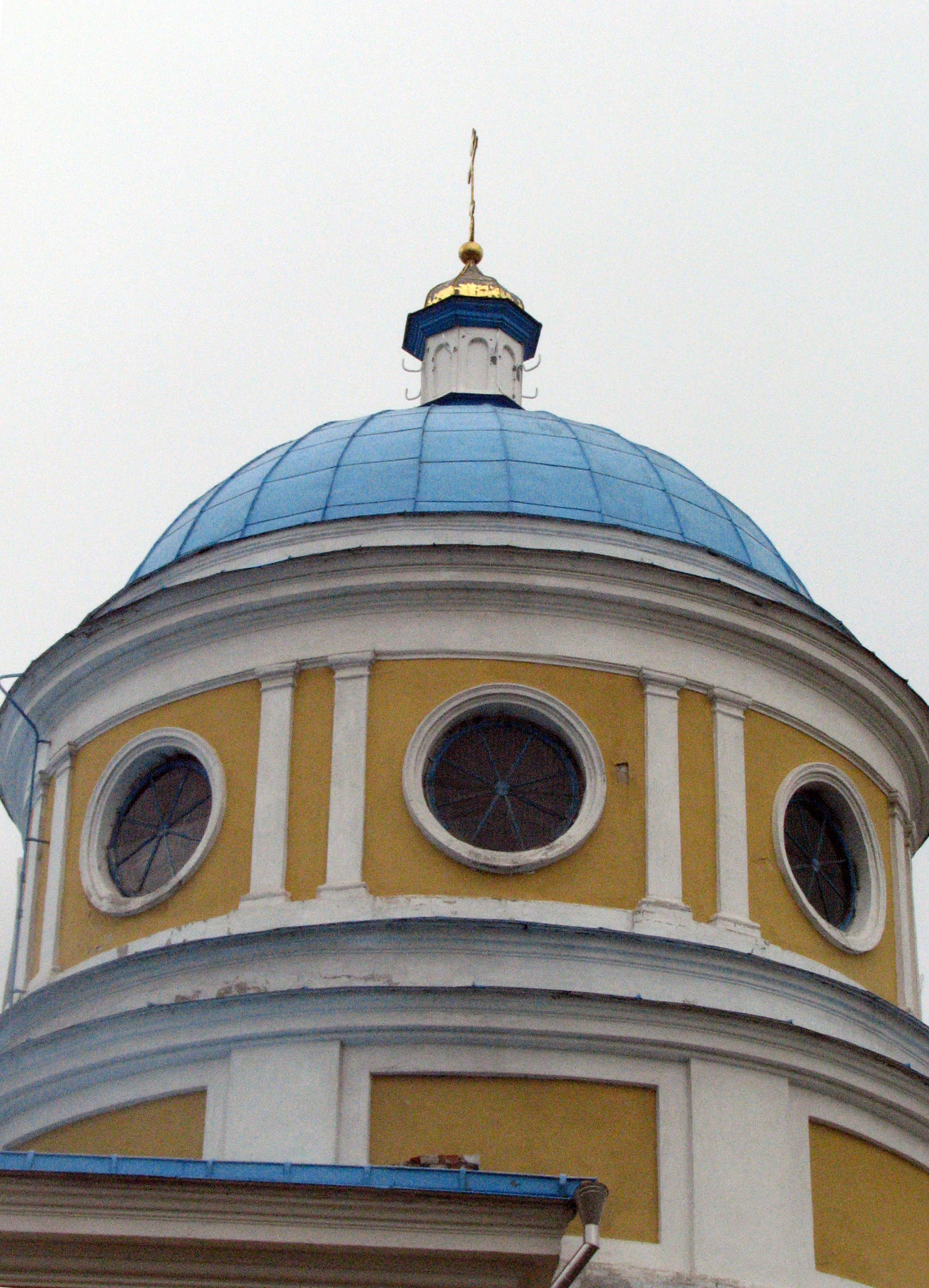 Беларуская (тарашкевіца): Сабор Аляксандра Неўскага (Пружаны)